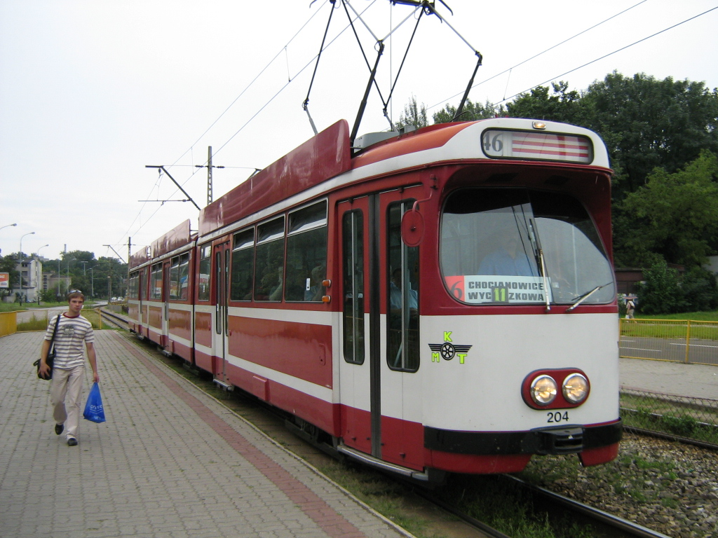 Tramwaj jednokierunkowy DÜWAG GT8 wyprodukowany dla Fryburga Bryzgowijskiego na przystanku tramwajowym na linii 46 w Łodzi.